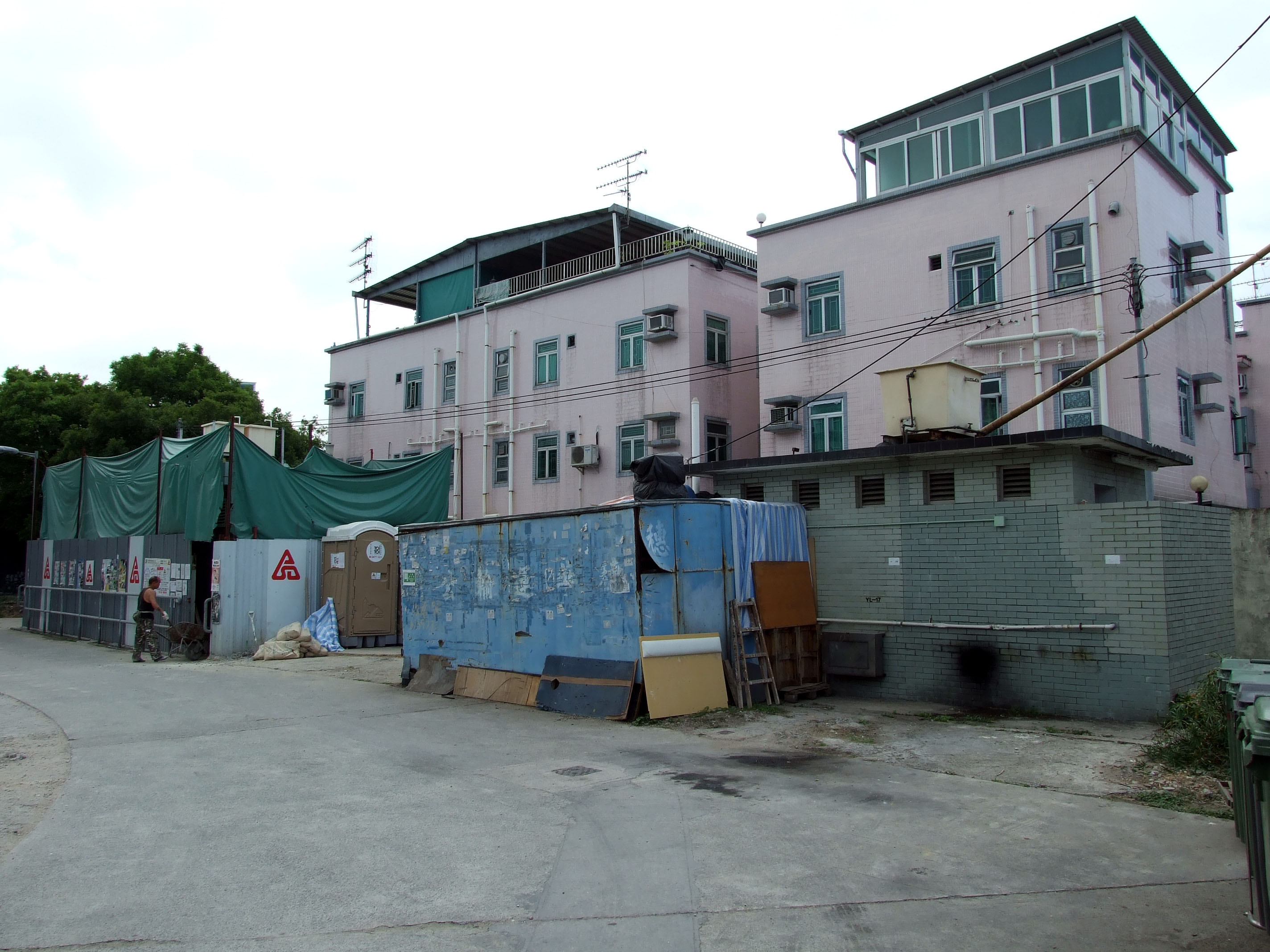 中文（香港）: 元朗十八鄉水蕉老圍舊旱廁（右）及興建中第6期的新公廁（左）